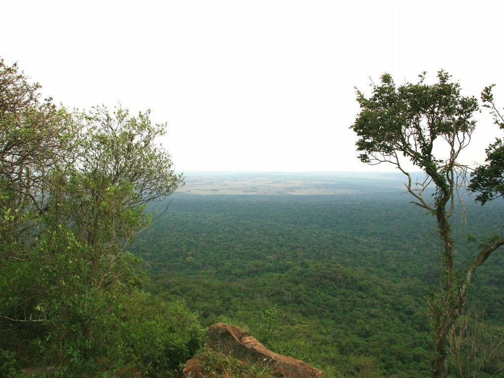 Vista oeste do Parque Estadual do Morro do Diabo.